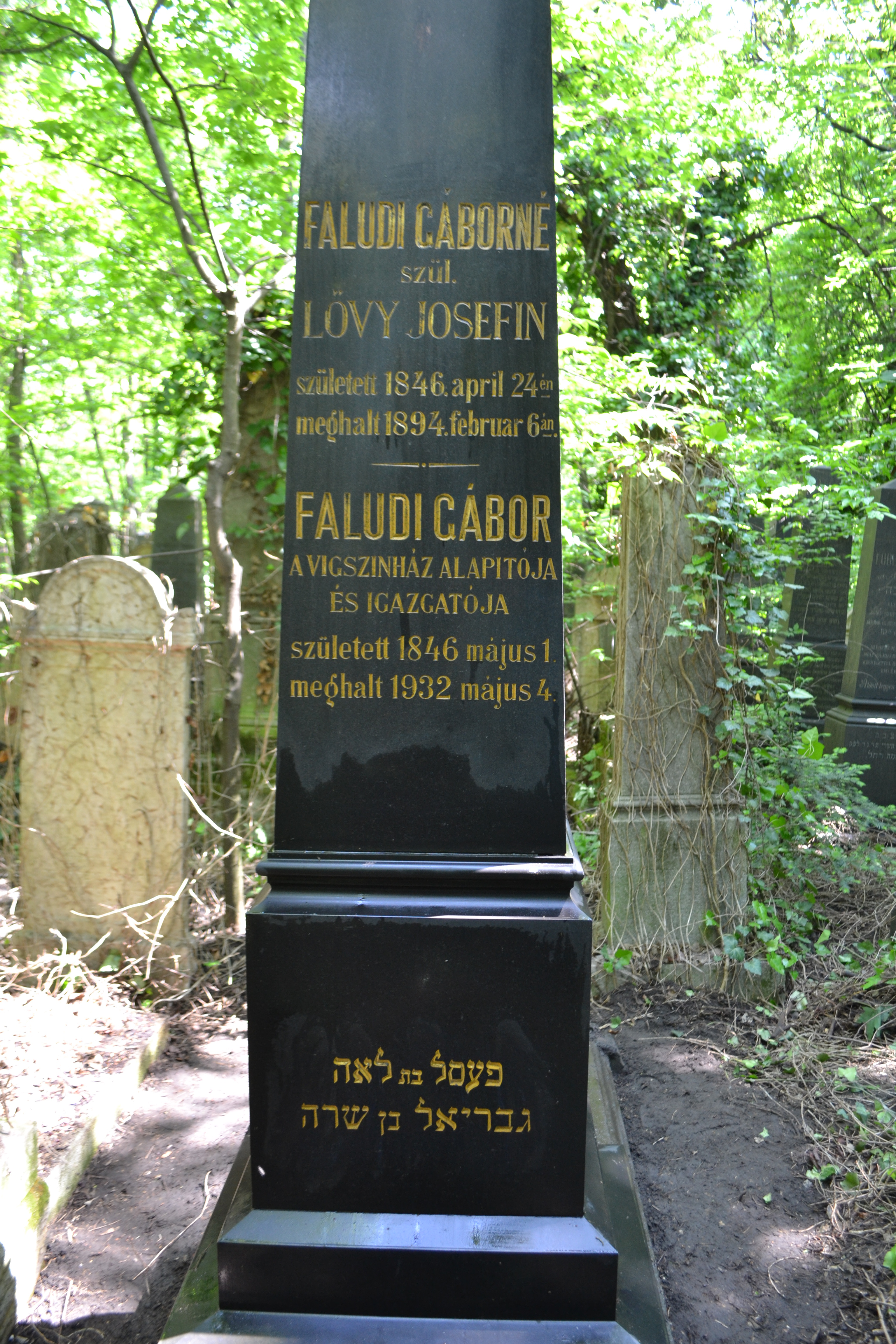 Faludi Gábor sírja a Salgótarjáni úti zsidó temetőnél.